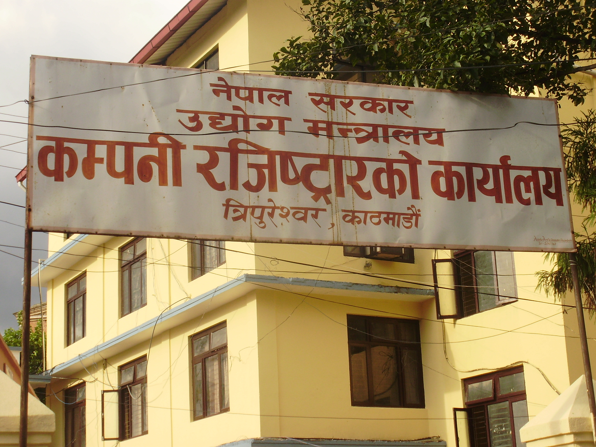 Template:कम्पनी रजिष्ट्रारको कार्यालय,त्रिपुरेश्वर, काठमाण्डौ, नेपाल